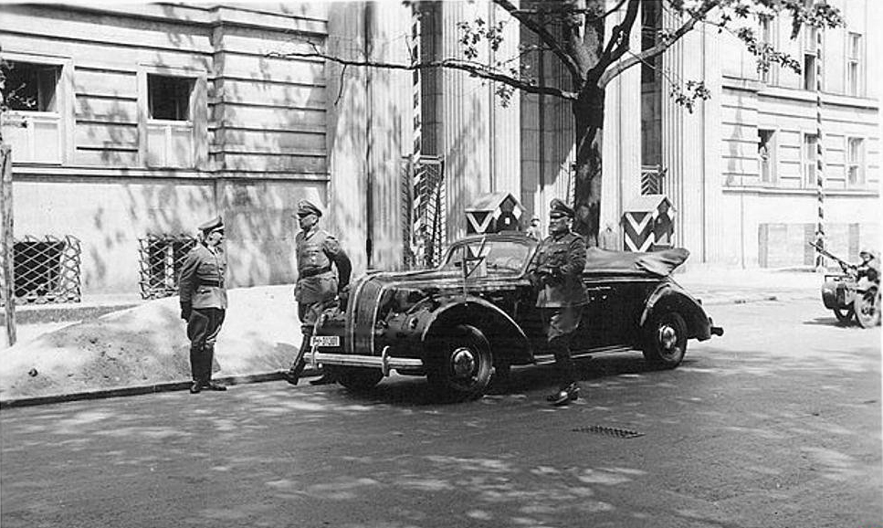 Al. Szucha 25 Avenue, Warsaw. Headquaters of Sicherheitspolizei (SiPo), and the seat of KdS Warschau (Der commandant of Sicherheitspolizei und SD für den Distrikt Warschau) during occupation of Poland. The cellars were used as torture and killing chambers. From [1]